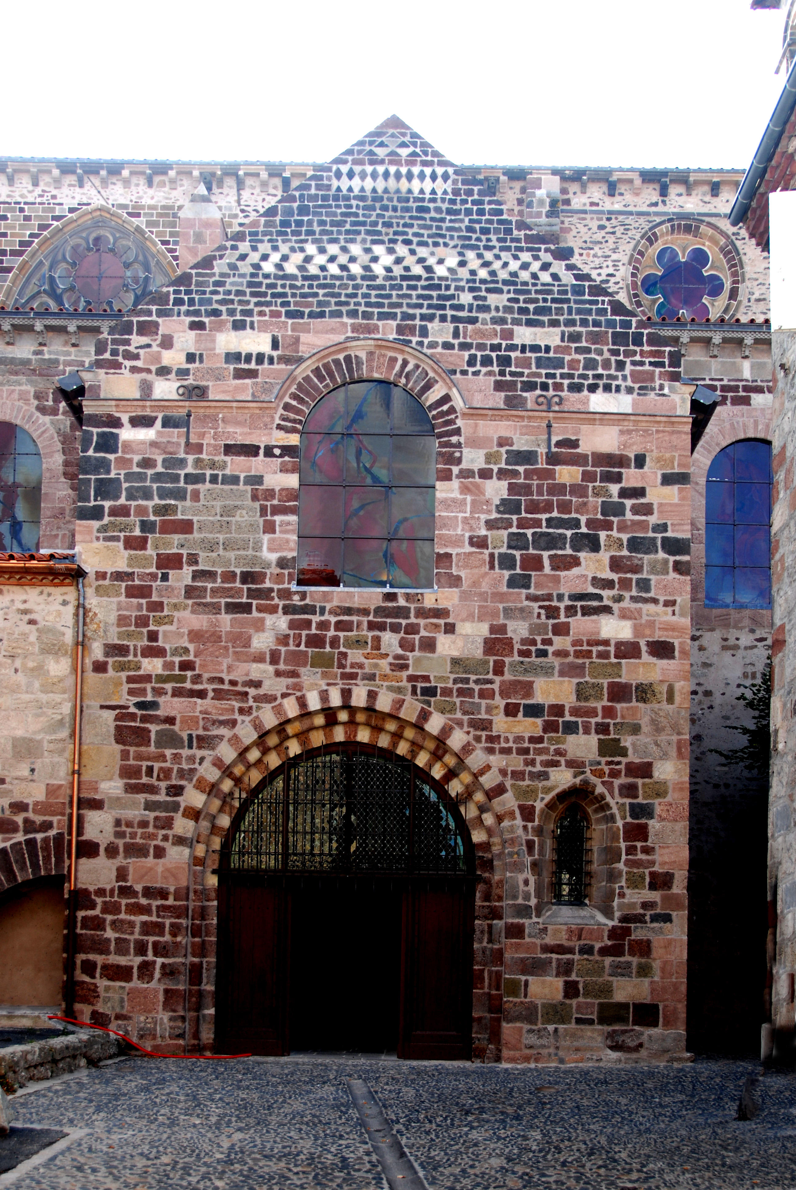 St.-Julien Brioude, Giebel NW-Vorhalle